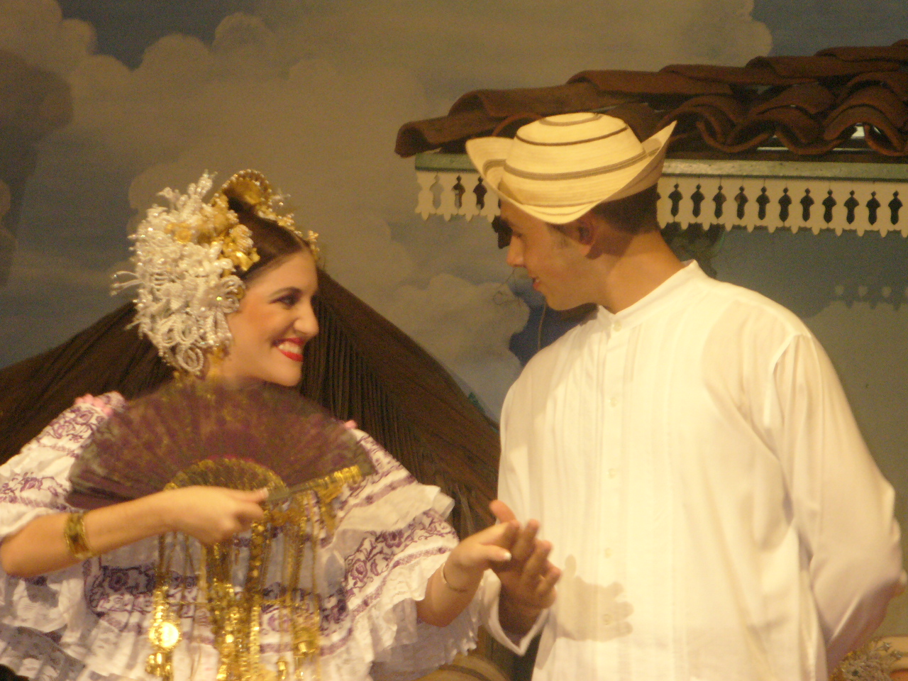 Camisilla santeña.